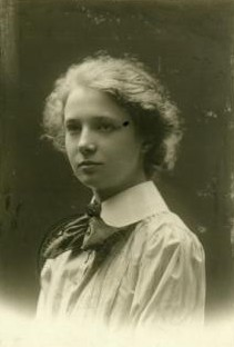 Albína Dratvová, česká filozofka